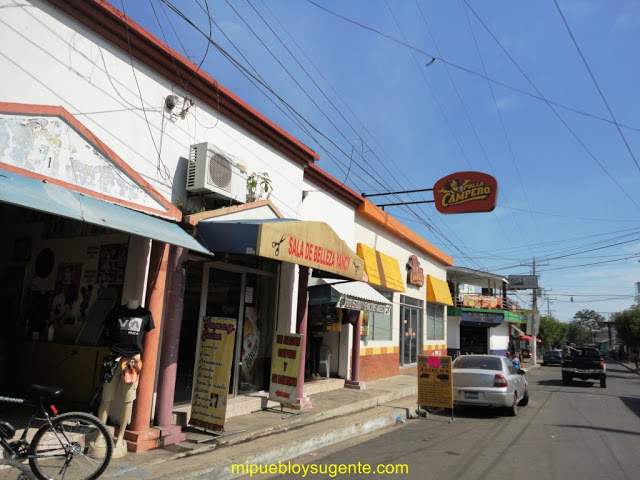 Descripción del comercio en el municipio de El Tránsito